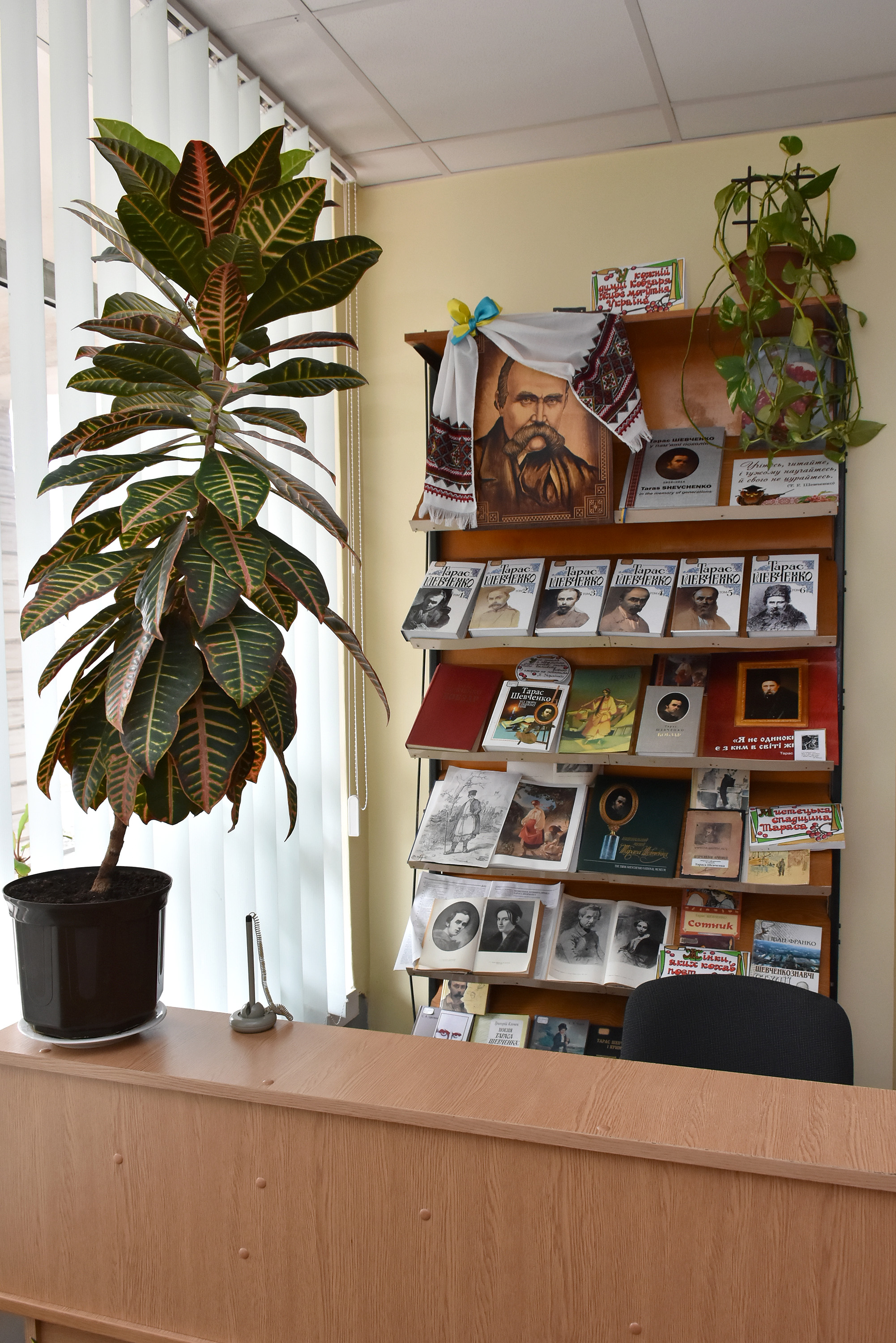 Бібліотека № 5 для дорослих Тернопільської міської централізованої бібліотечної системи.